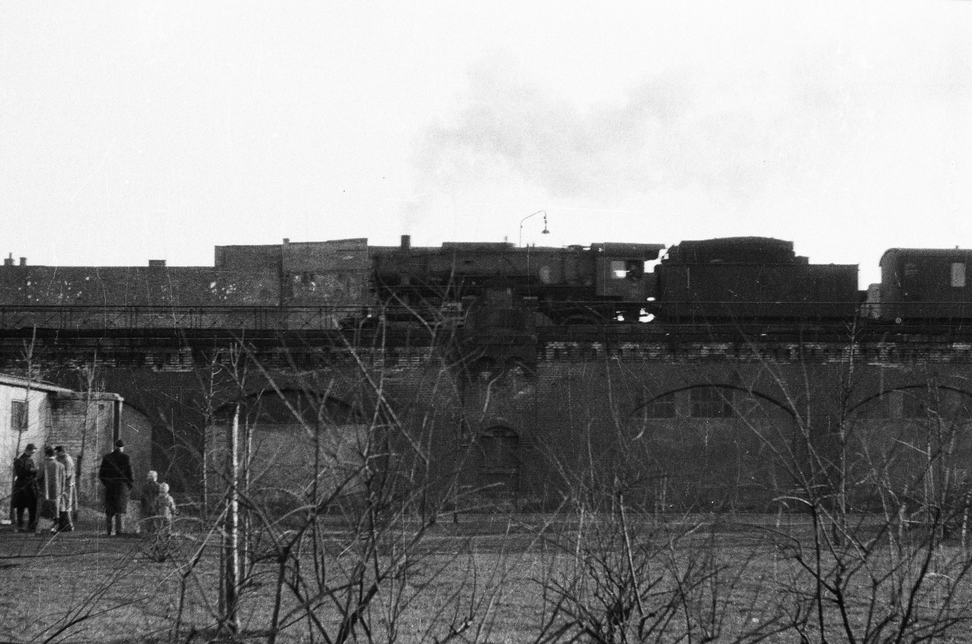 Estakada kolejowa we Wrocławiu, ok. 1960 r., prawdopodobnie okolice ul. Zielińskiego.